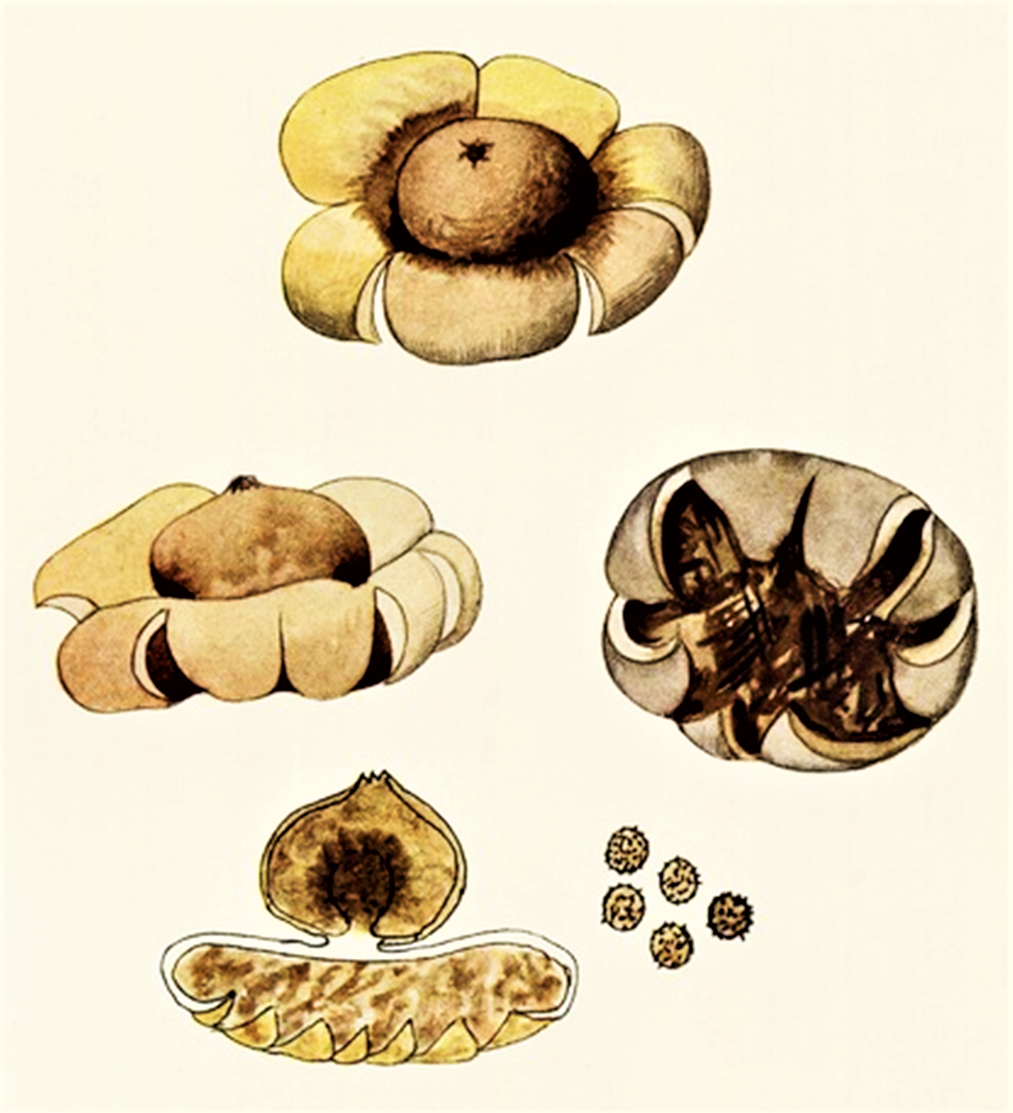 Giacomo Bresadola: Geastrum fimbriatum (Fr. (1829), beschrieben als Geaster fimbriatus